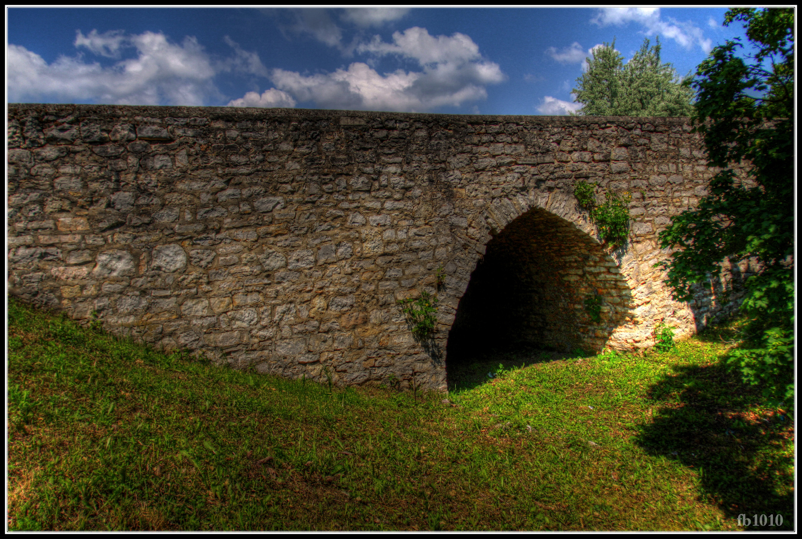 Híd (Dörgicse, KISDÖRGICSE, Akali-pécselyi úton) This is a photo of a monument in Hungary, Identifier: 9860